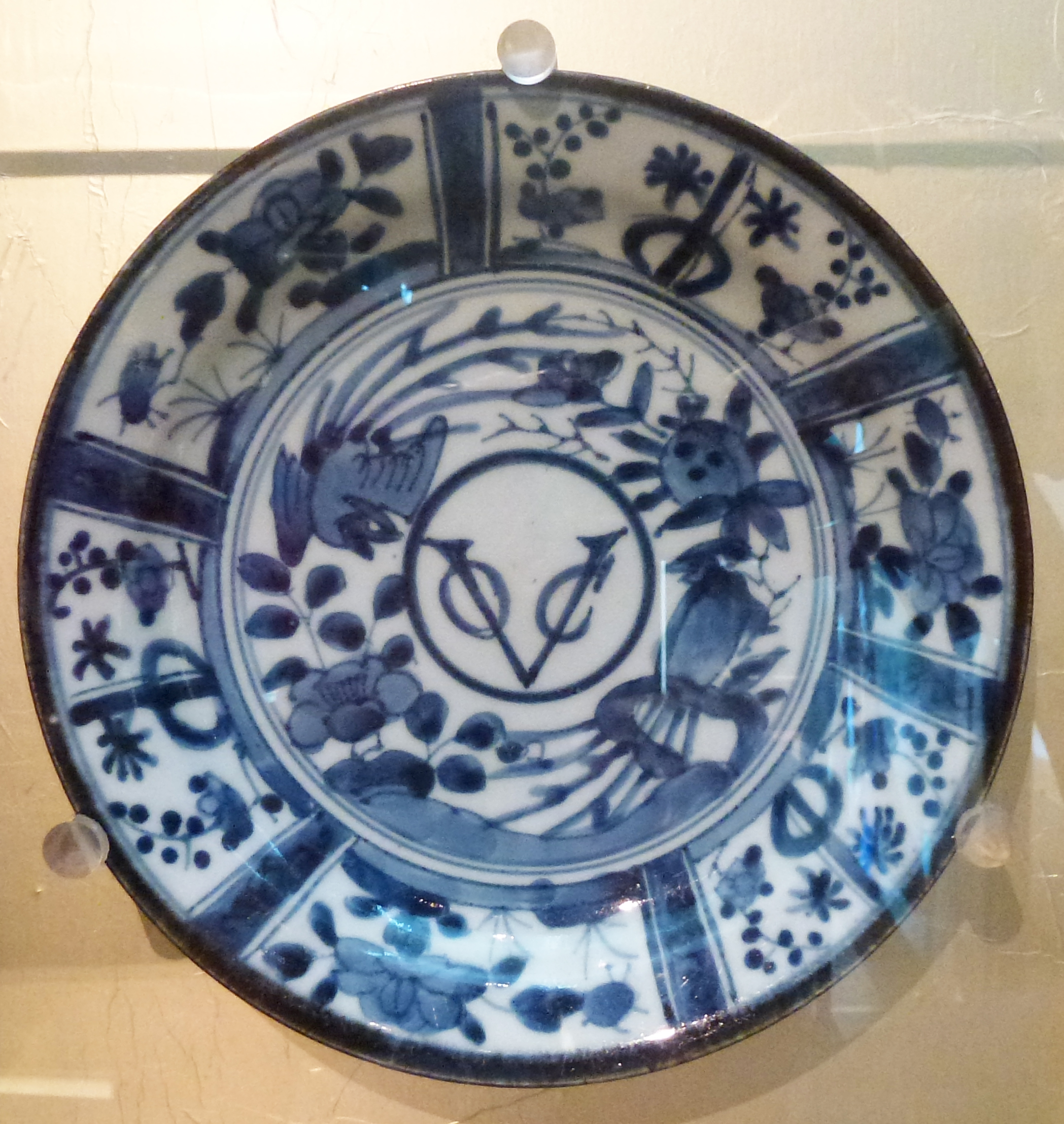 Blauw-wit VOC bord uit 1650-1674. Op bestelling van de bestuurders van de compagnie in Batavia (het huidige Jakarta) gemaakt in Japan